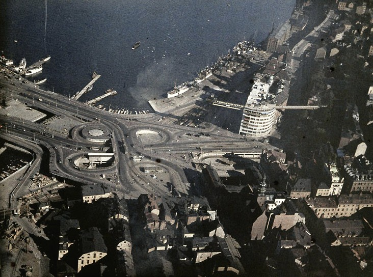 Flygbild över Slussen 1936